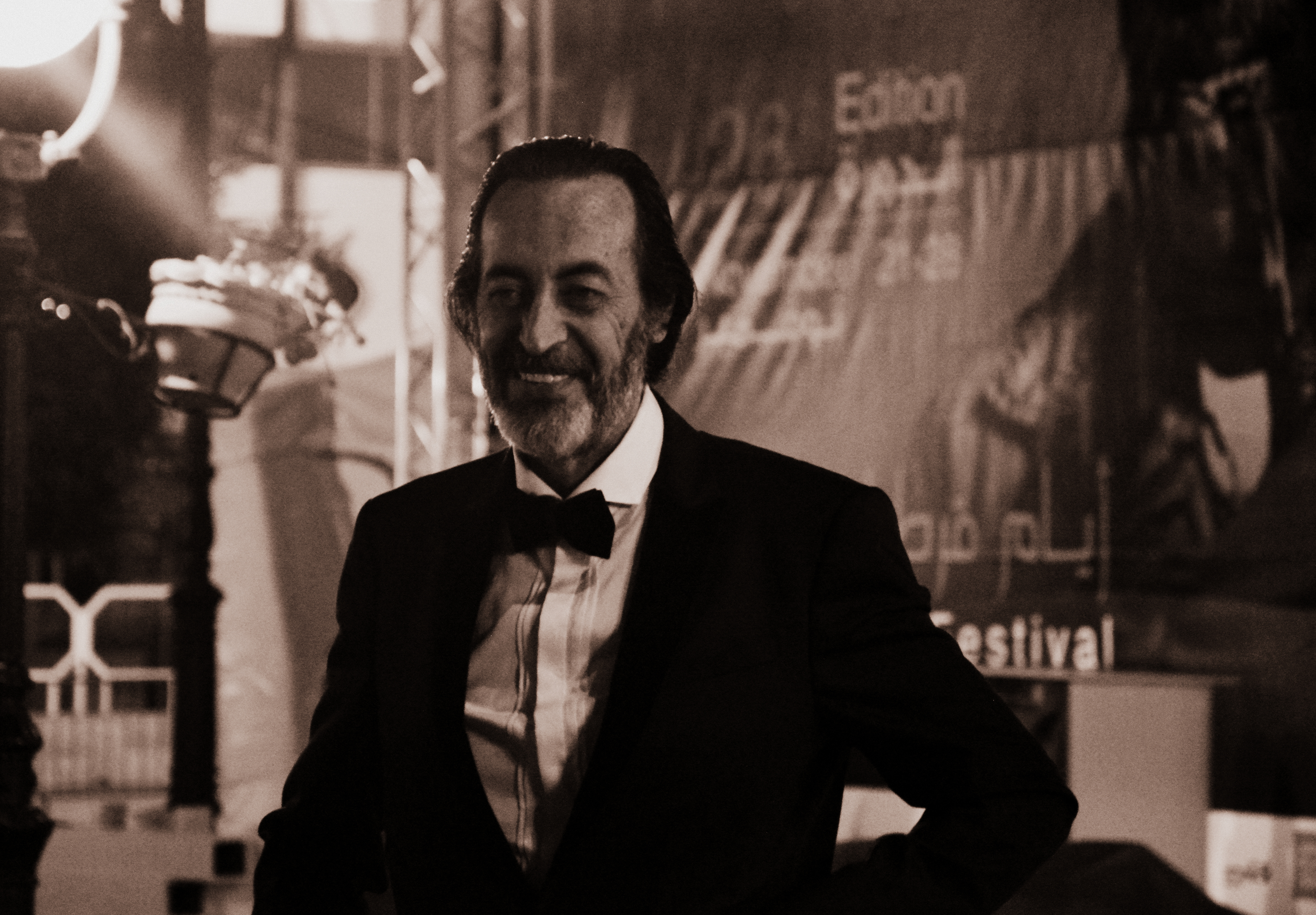 Hichem Rostom, acteur tunisien